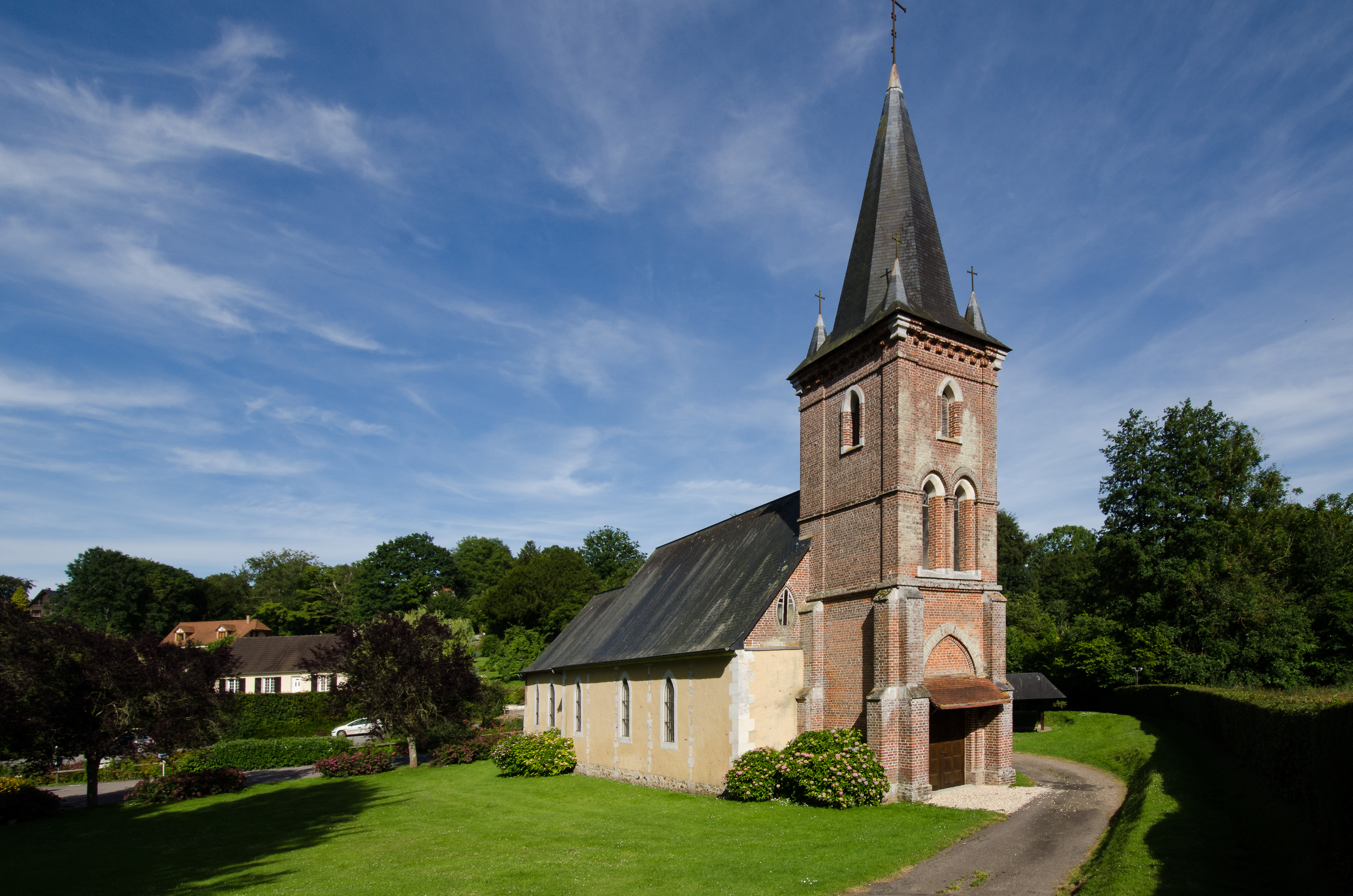 Vue de l'église